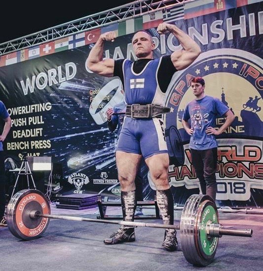 Mikko Mäntymäki GPA:n MM-kisoissa Kiovassa 2018.